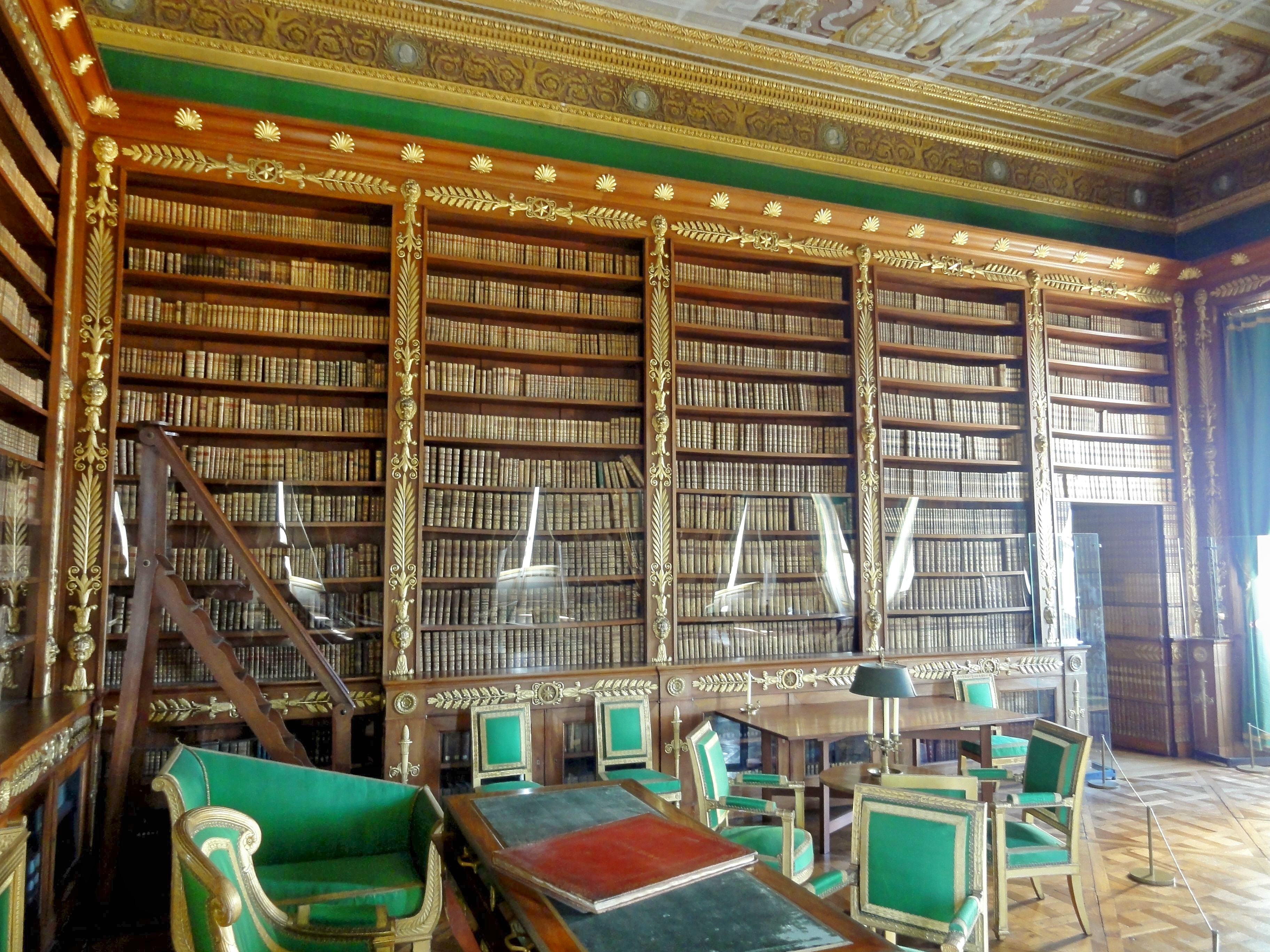 Bibliothèque de l'Empereur (Premier Empire).